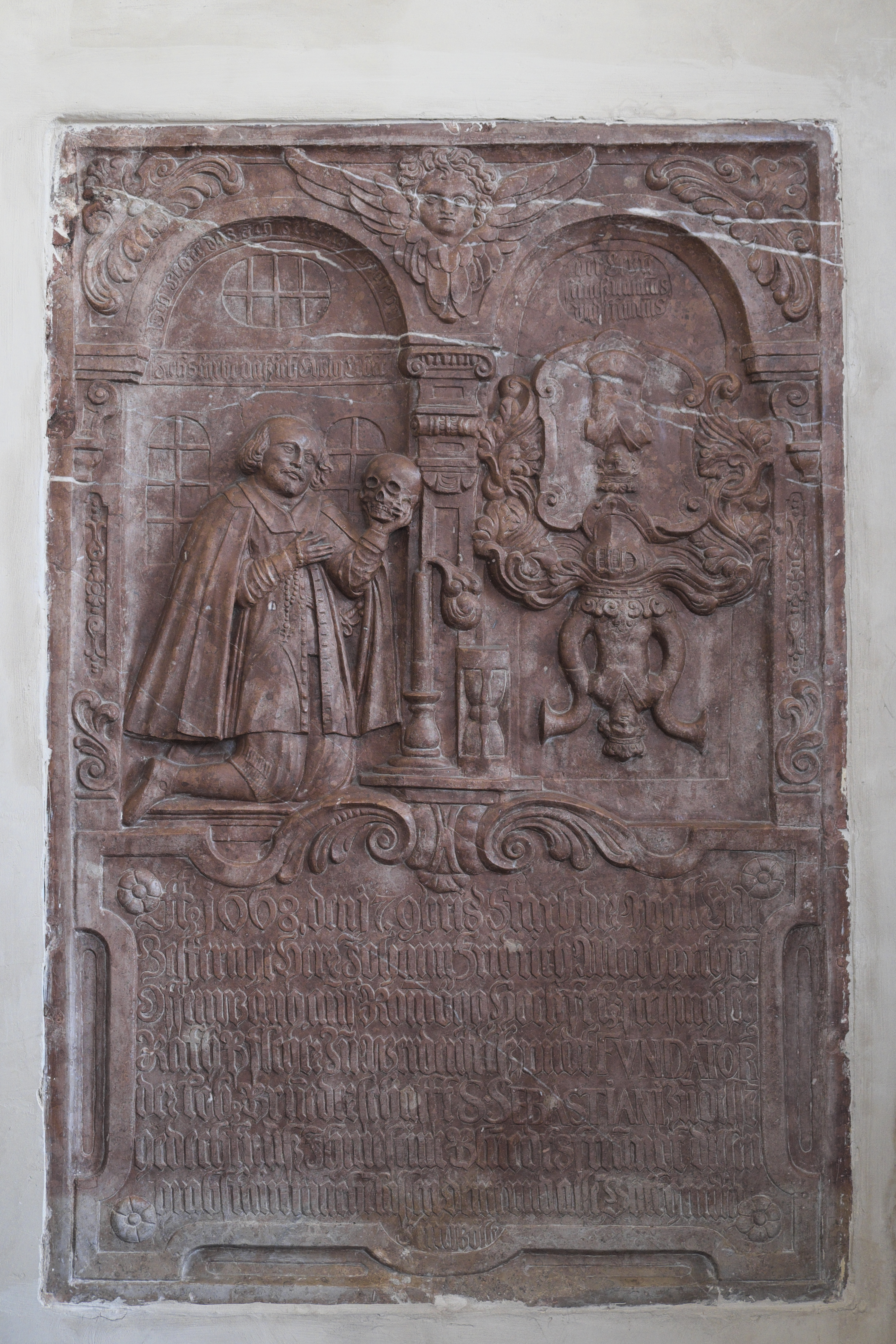 Katholische Pfarrkirche St. Magnus in Huglfing im Landkreis Weilheim-Schongau (Bayern/Deutschland), Epitaph für Johann Friedrich Morhart (gestorben 1668)